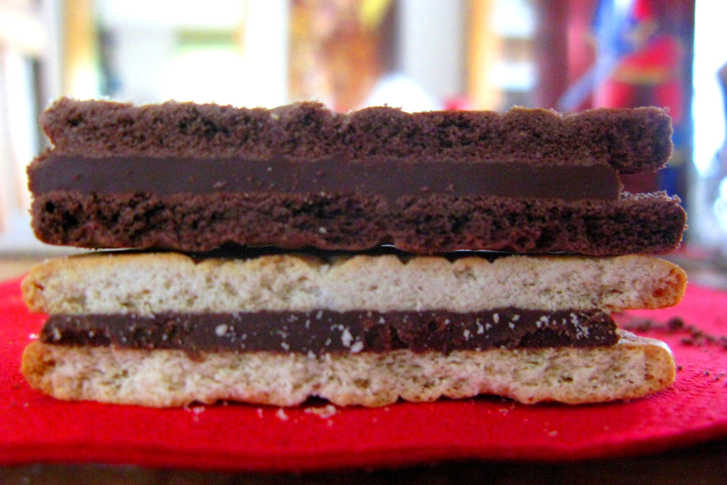 Prinzenrolle